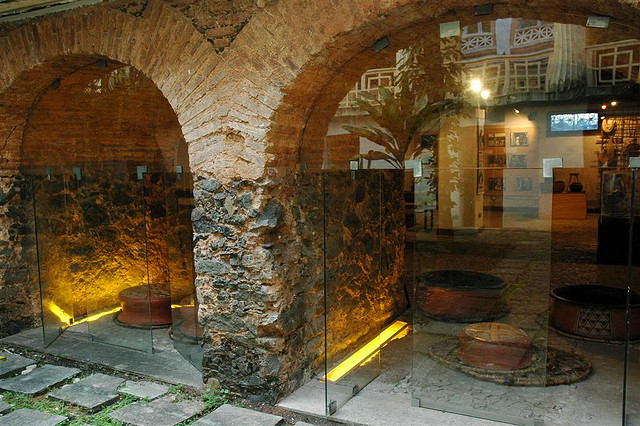 MAE-UFBA